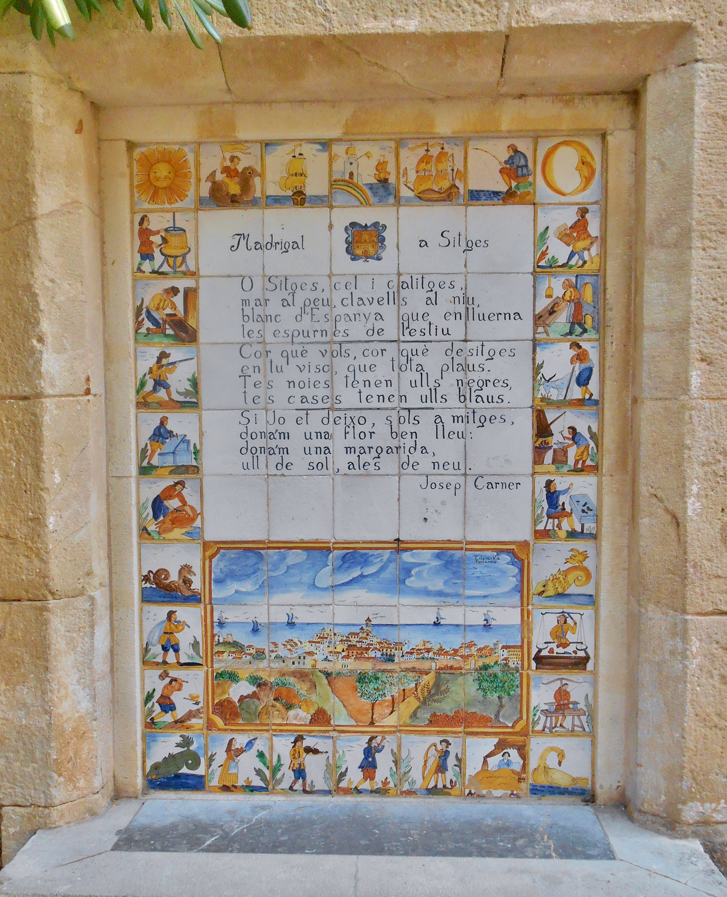 Sitges.